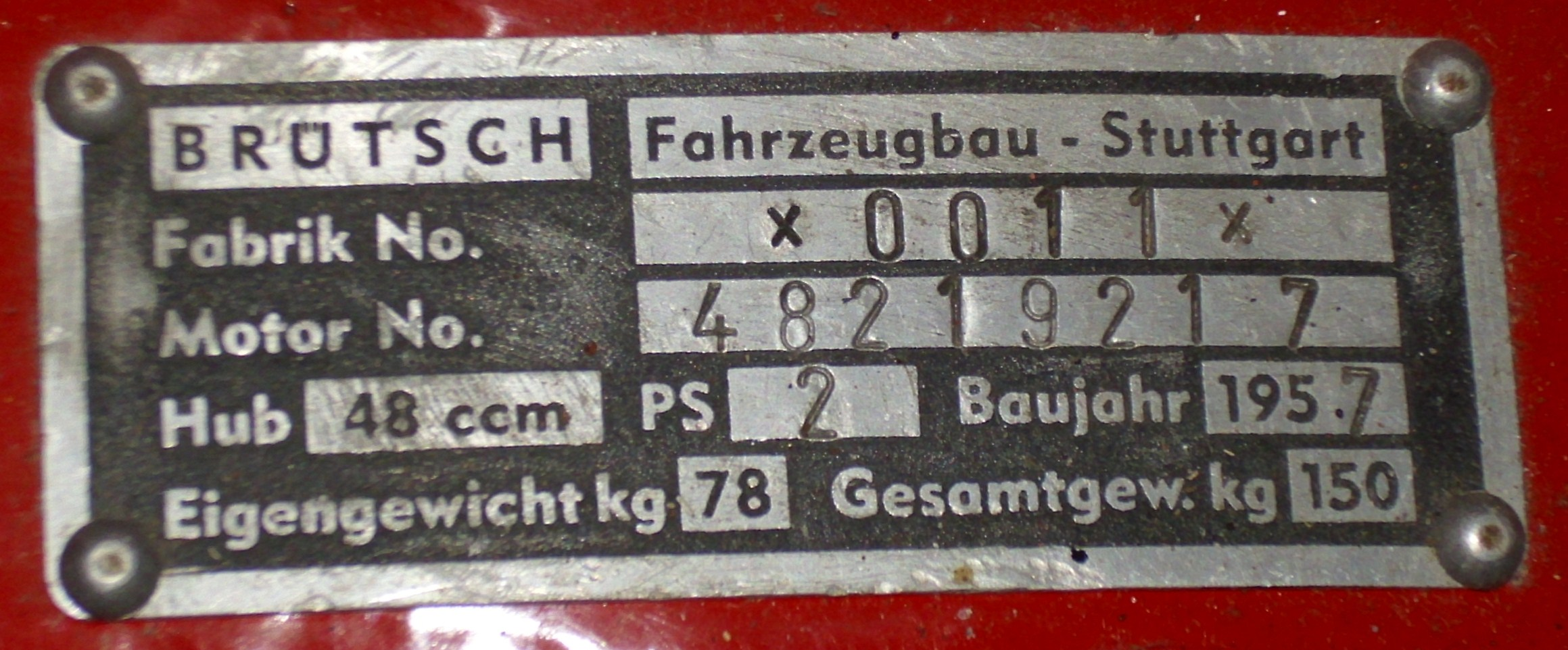 Emblem/Typenschild Brütsch Mopetta 1957